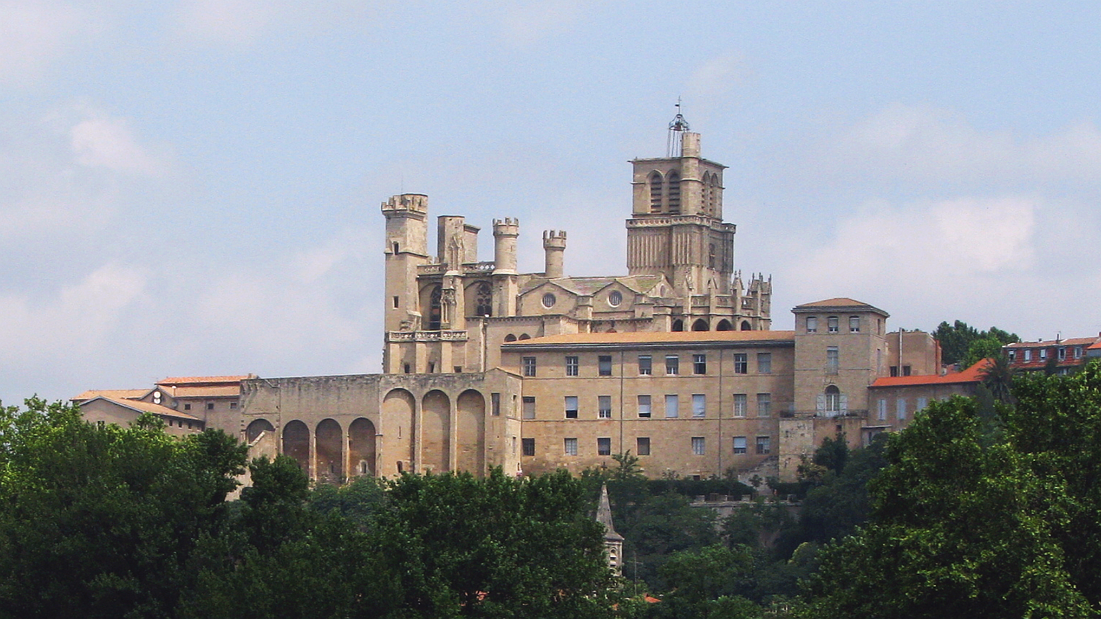 Katholische gotische Cathédrale Saint-Nazaire de Béziers aus dem 15. Jh - Hérault Okzitanien Fankreich Foto Wolfgang Pehlemann IMG_1078